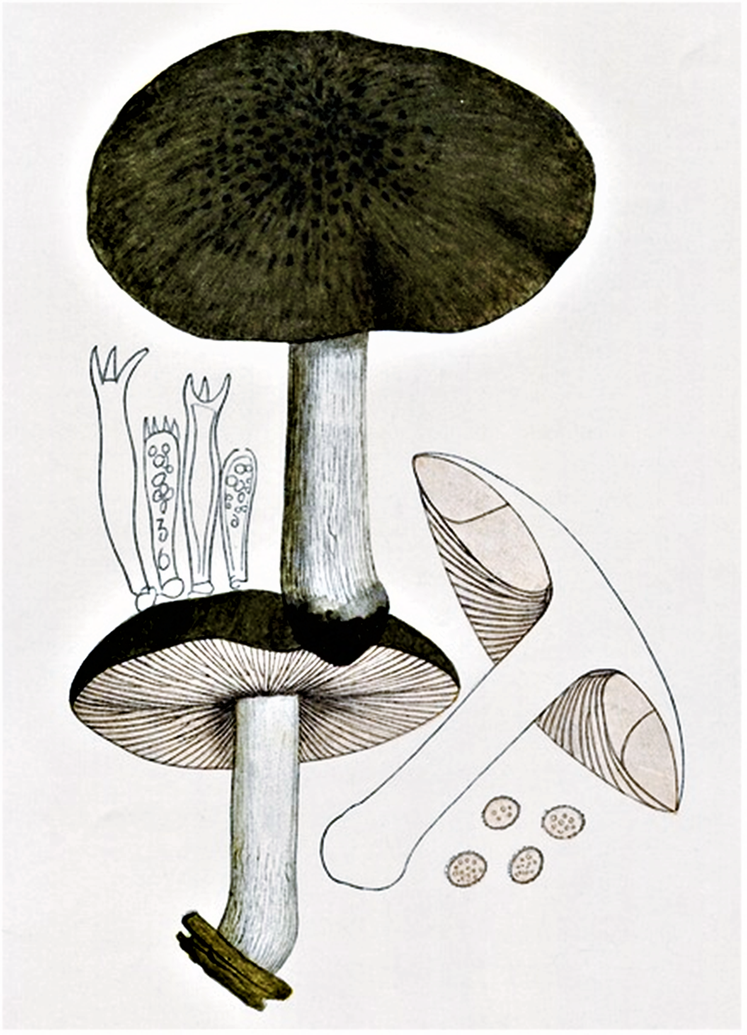 Giacomo Bresadola: Pluteus cervinus (Schaeff., 1774) P.Kumm. (1871)